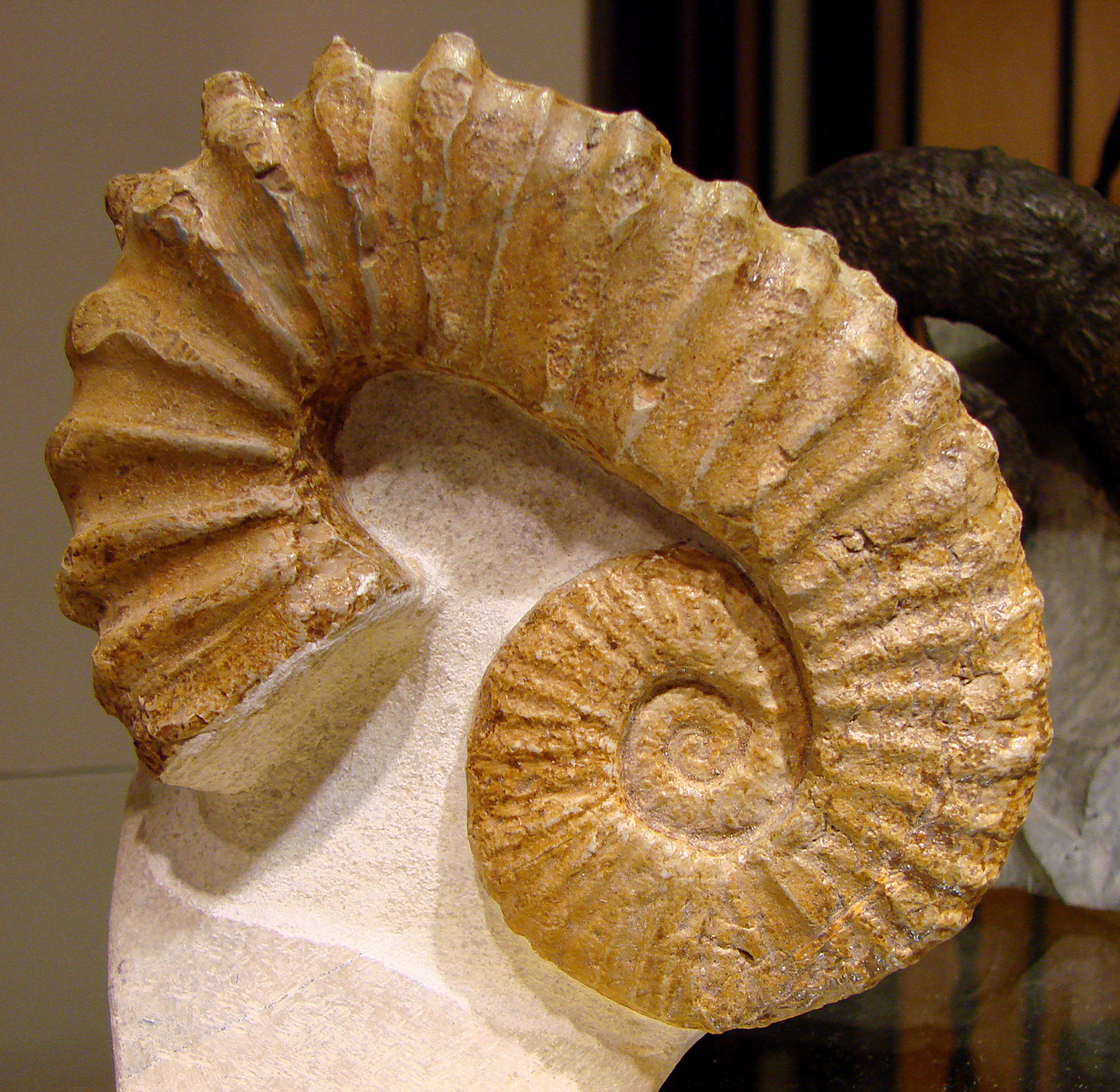 Pseudocrioceras brevis. Provenance: La Bedoule.